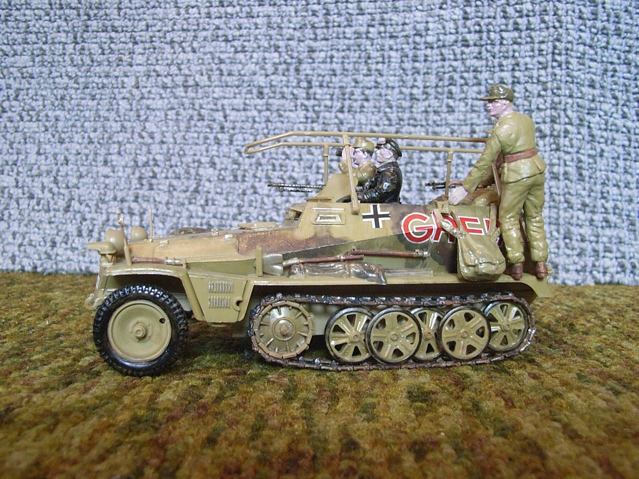 Sd.kfz.250/3 Greif (Modell)